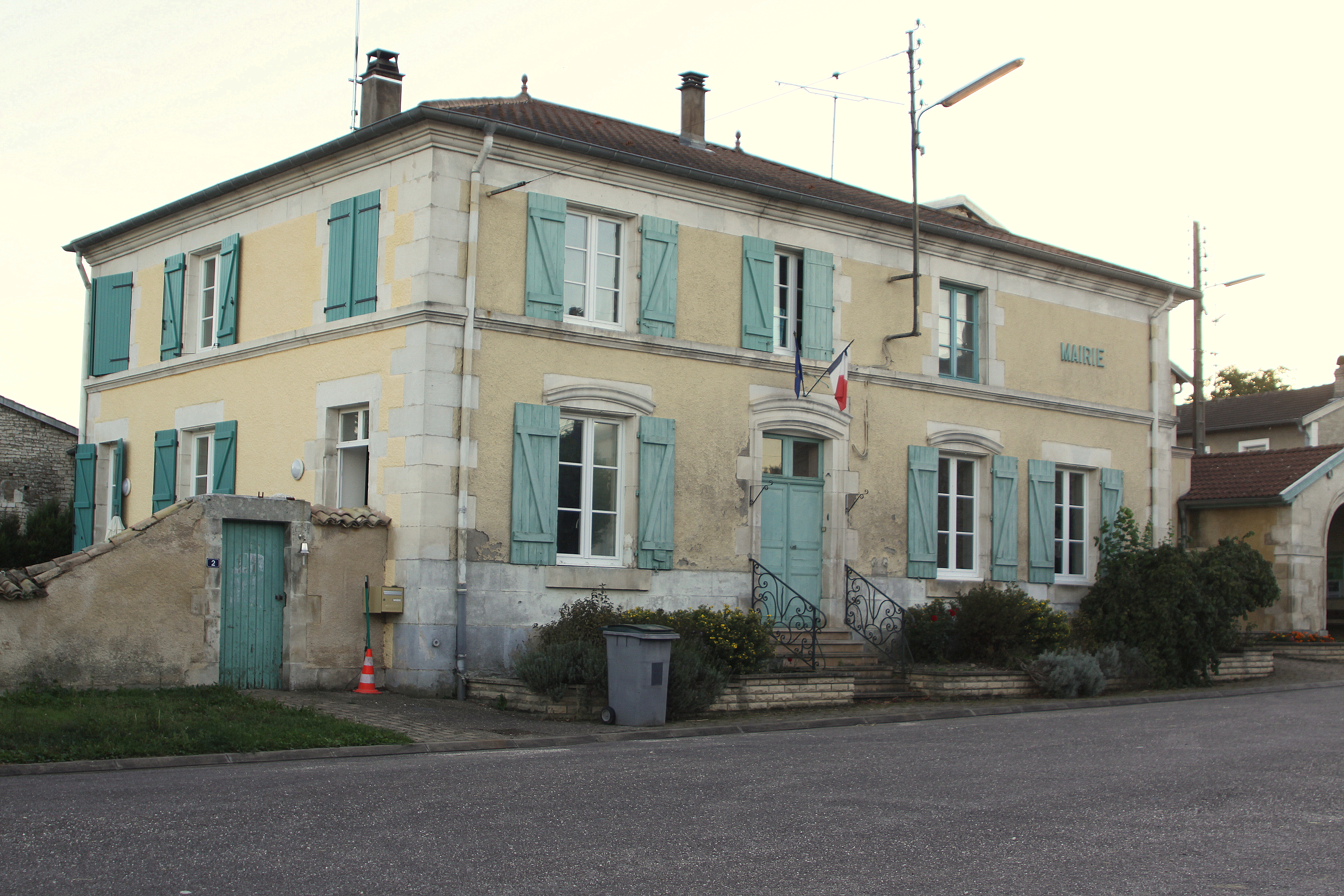 D'Märei vun Taillancourt 2012